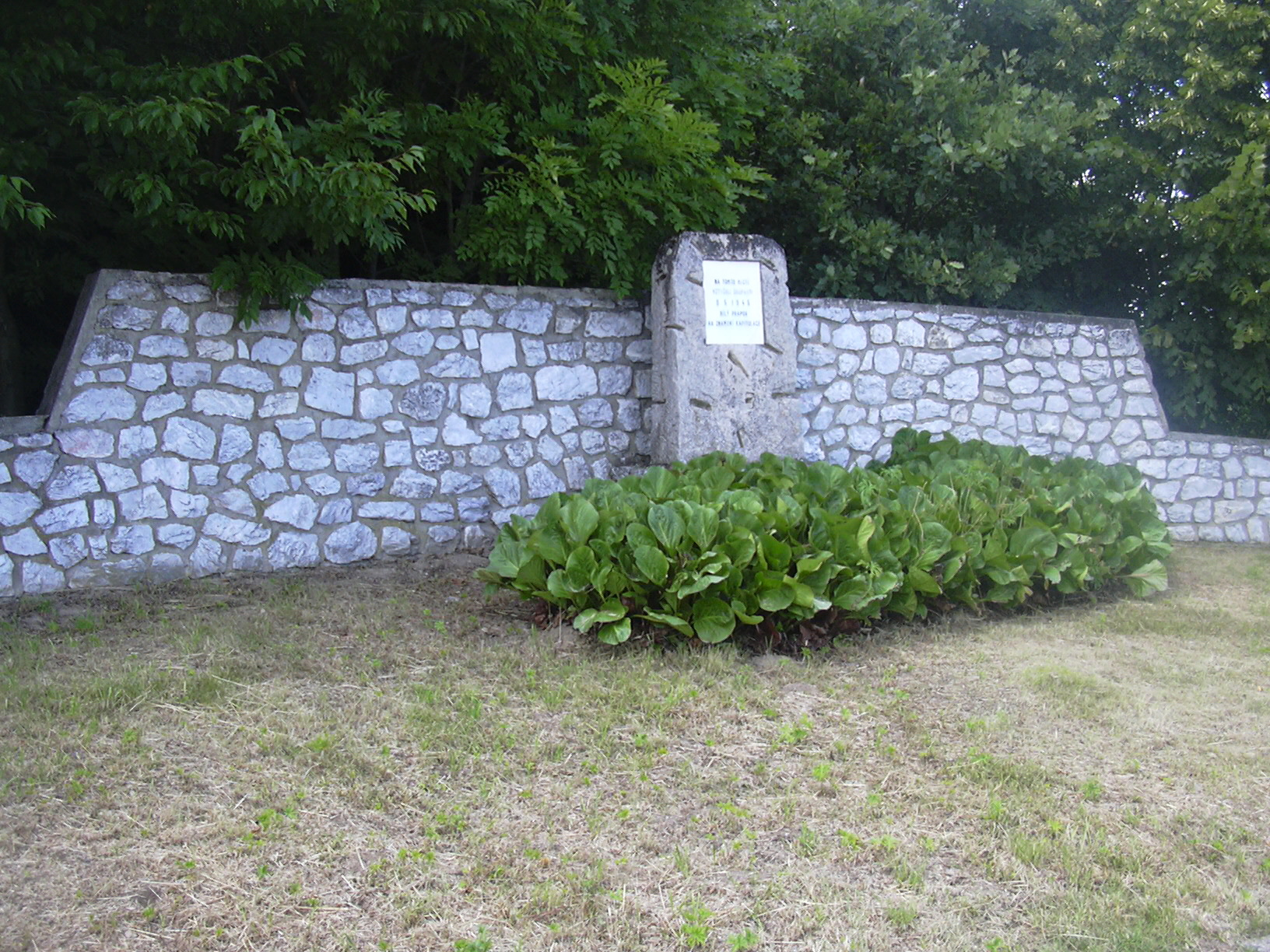 Ježkovice - pomník kapitulace německé armády z 2. světové války (Vyškov- Czech republic)